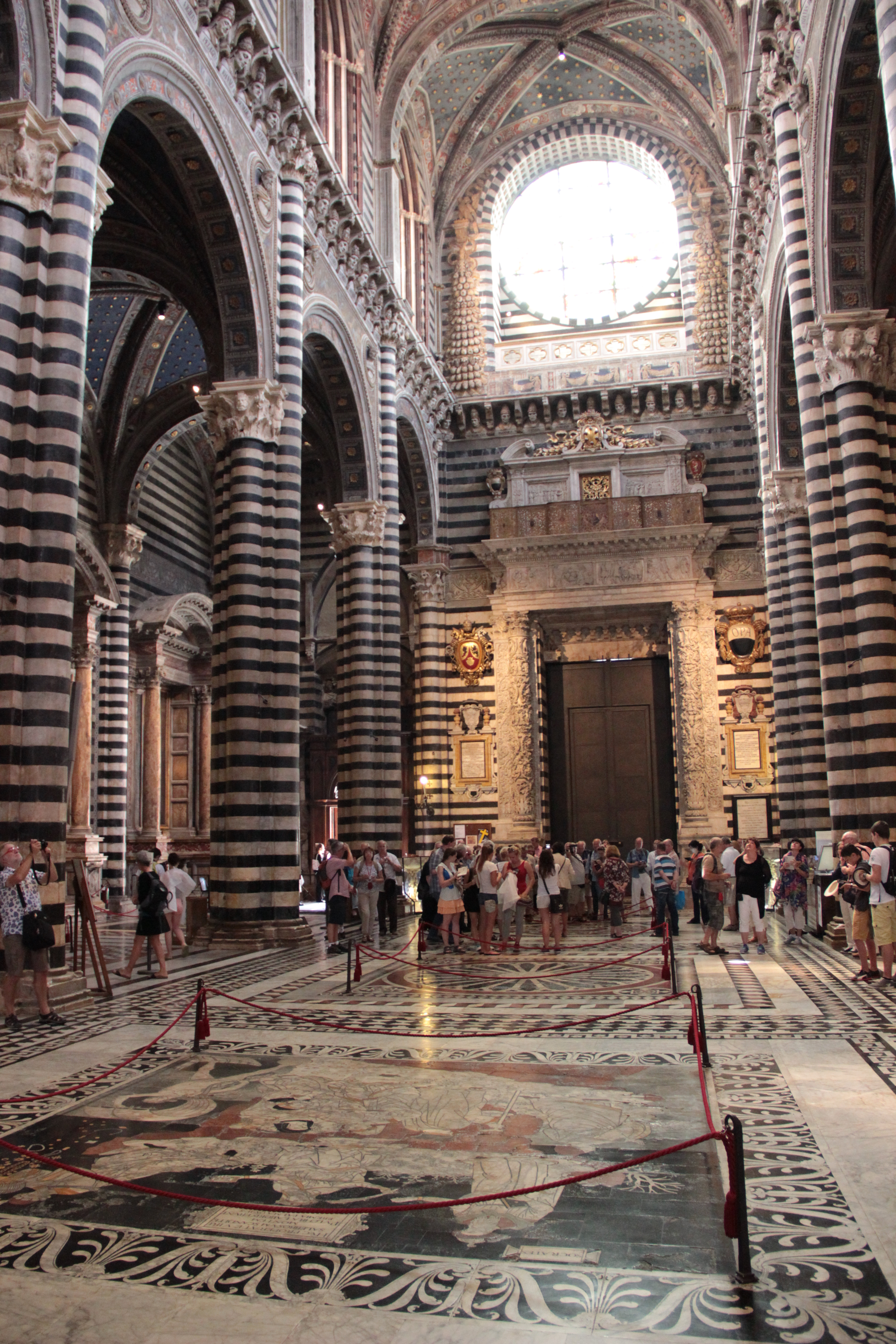 seina 04